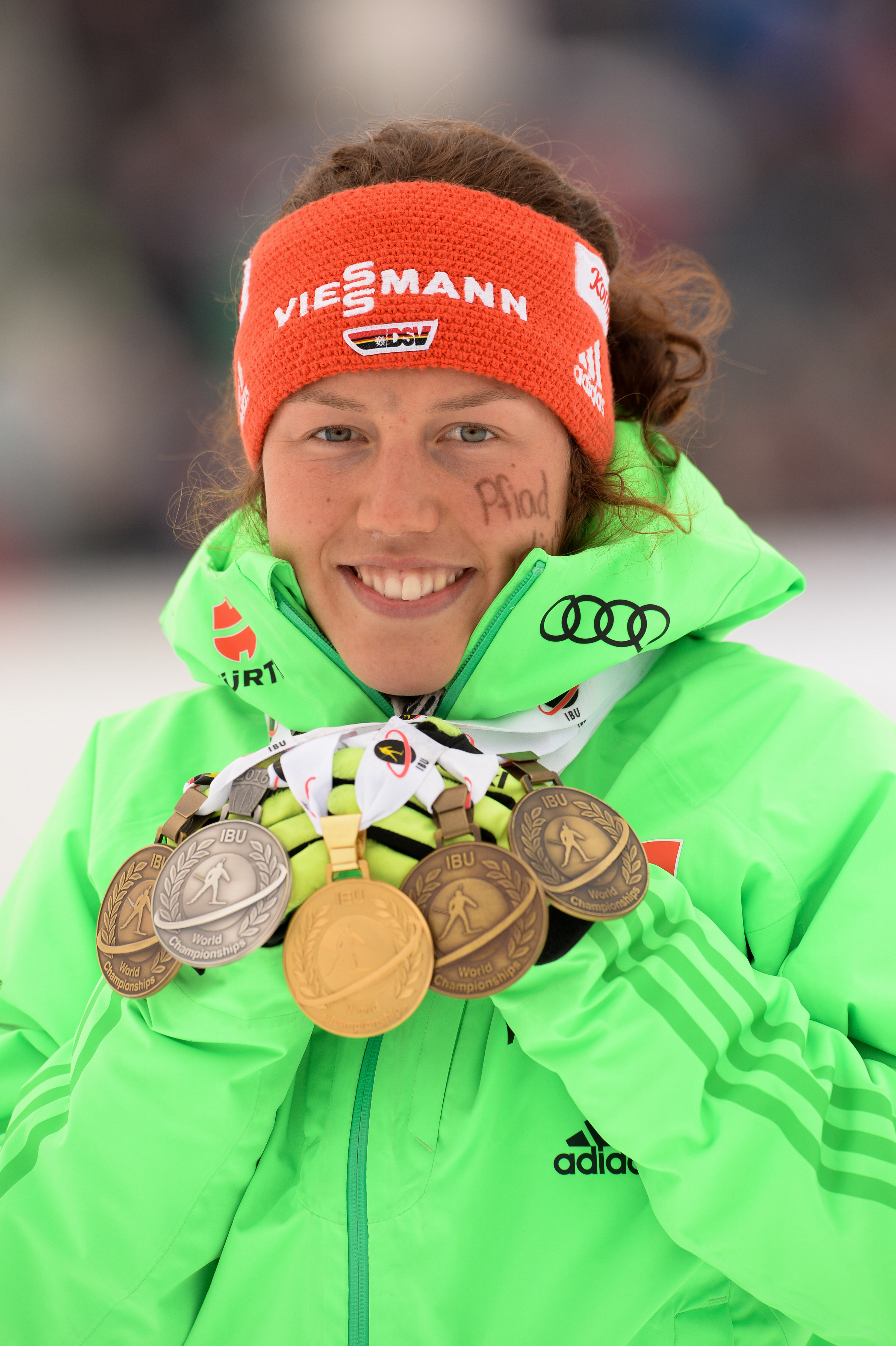 Laura Dahlmeier, deutsche Biathletin, mit ihren Erfolgen bei der Biathlon-Weltmeisterschaft in Oslo 2016